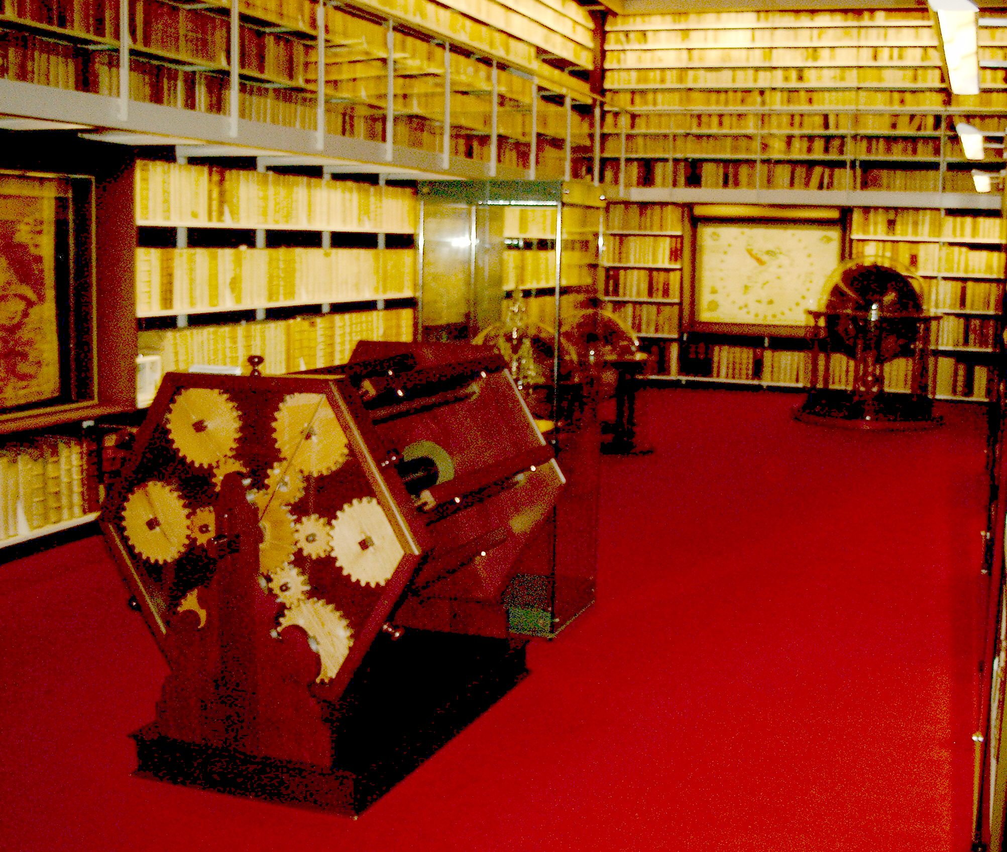 Herzog August Bibliothek Wolfenbüttel, Globensaal. Im Vordergrund eine Rekonstruktion des "Bücherrads" von Herzog August.